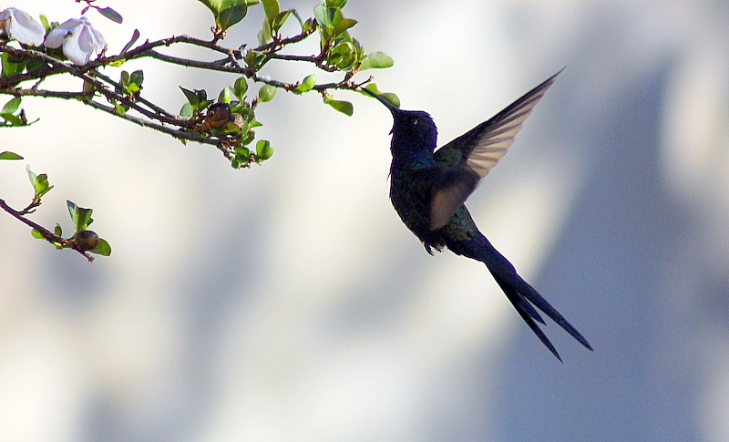 No quintal da casa de meus pais na cidade de Piraju-SP.